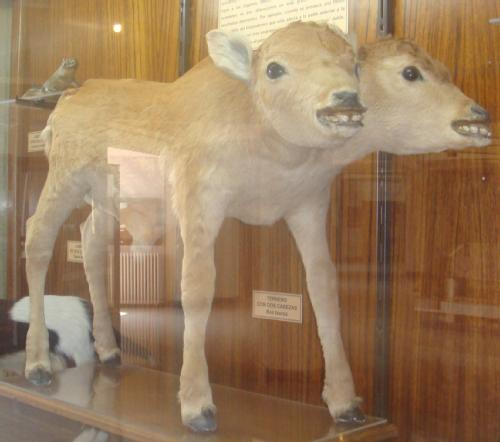 Ternera deformada y nacida con dos cabezas. Expuesta en la Universidad de Navarra. Con permiso para fotografiarla.